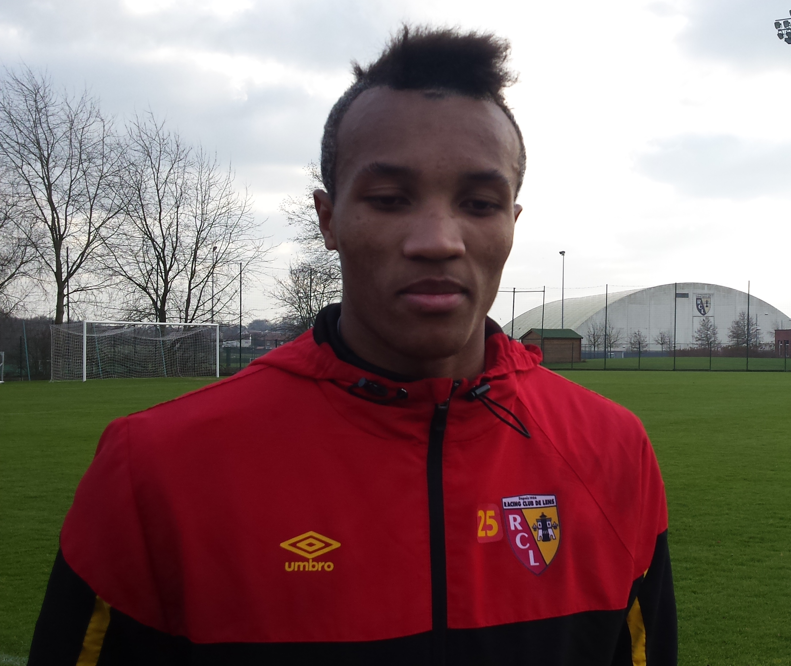 Jean-Philippe Gbamin après un entraînement public du Racing Club de Lens, le 31 décembre 2014, sur le terrain "San Siro" du Centre Technique et Sportif de La Gaillette.